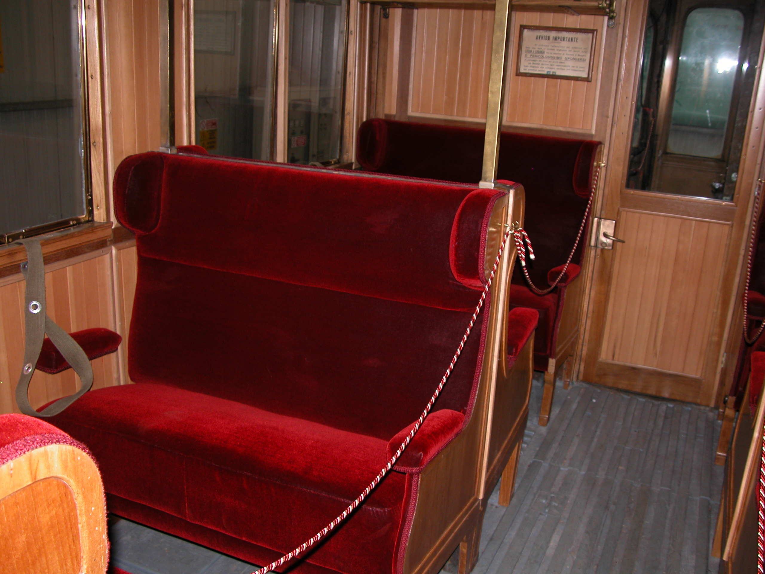 Automotrice elettrica FTC 16 – Scompartimento di 1ª classe restaurato.